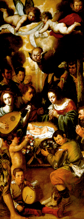 La Adoración de los Pastores (1634) de Pablo Legot para la Iglesia de Nuestra Sra. de la Oliva. Lebrija.